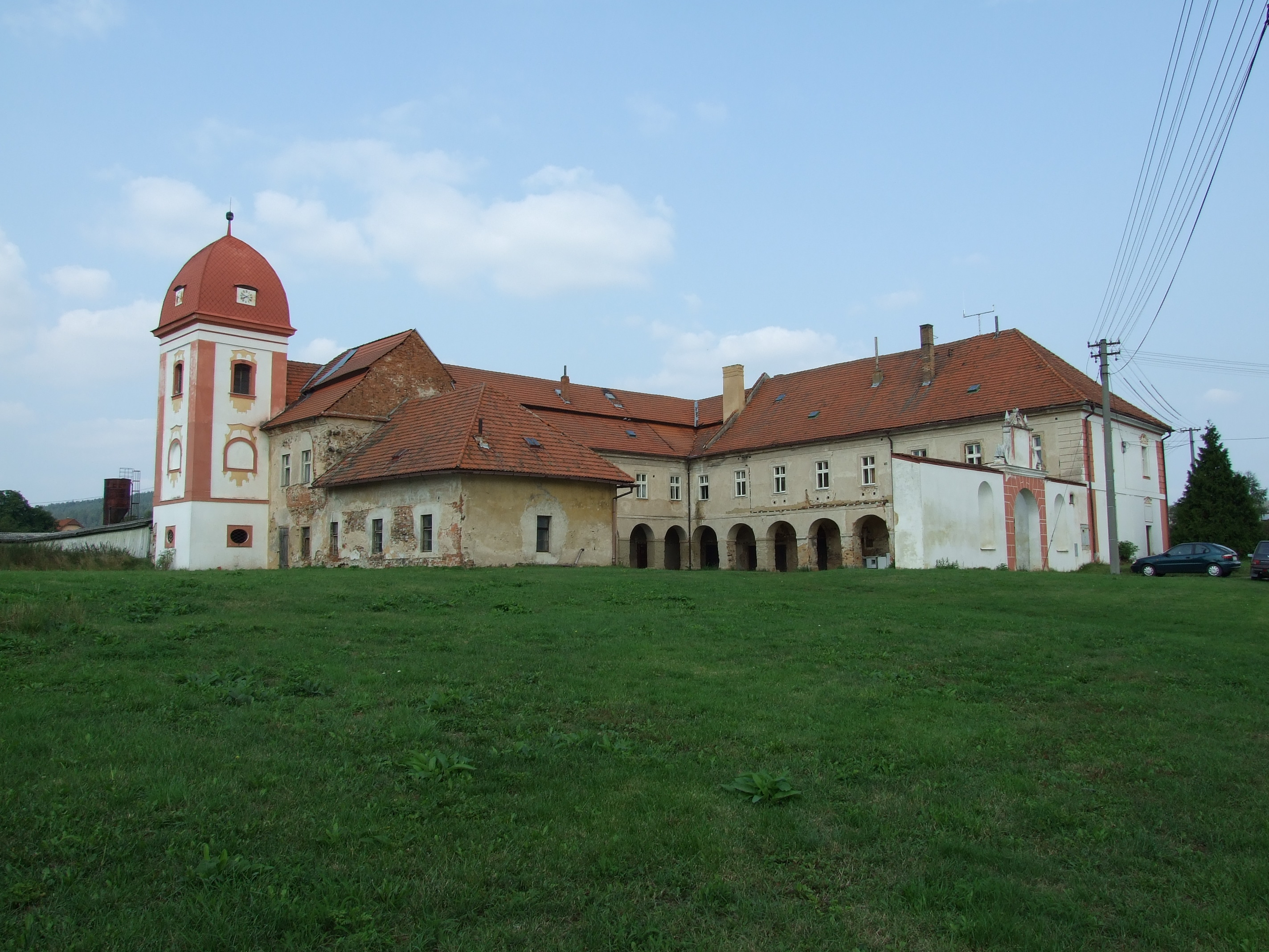 Zámek Osek, Osek 1, okres Rokycany